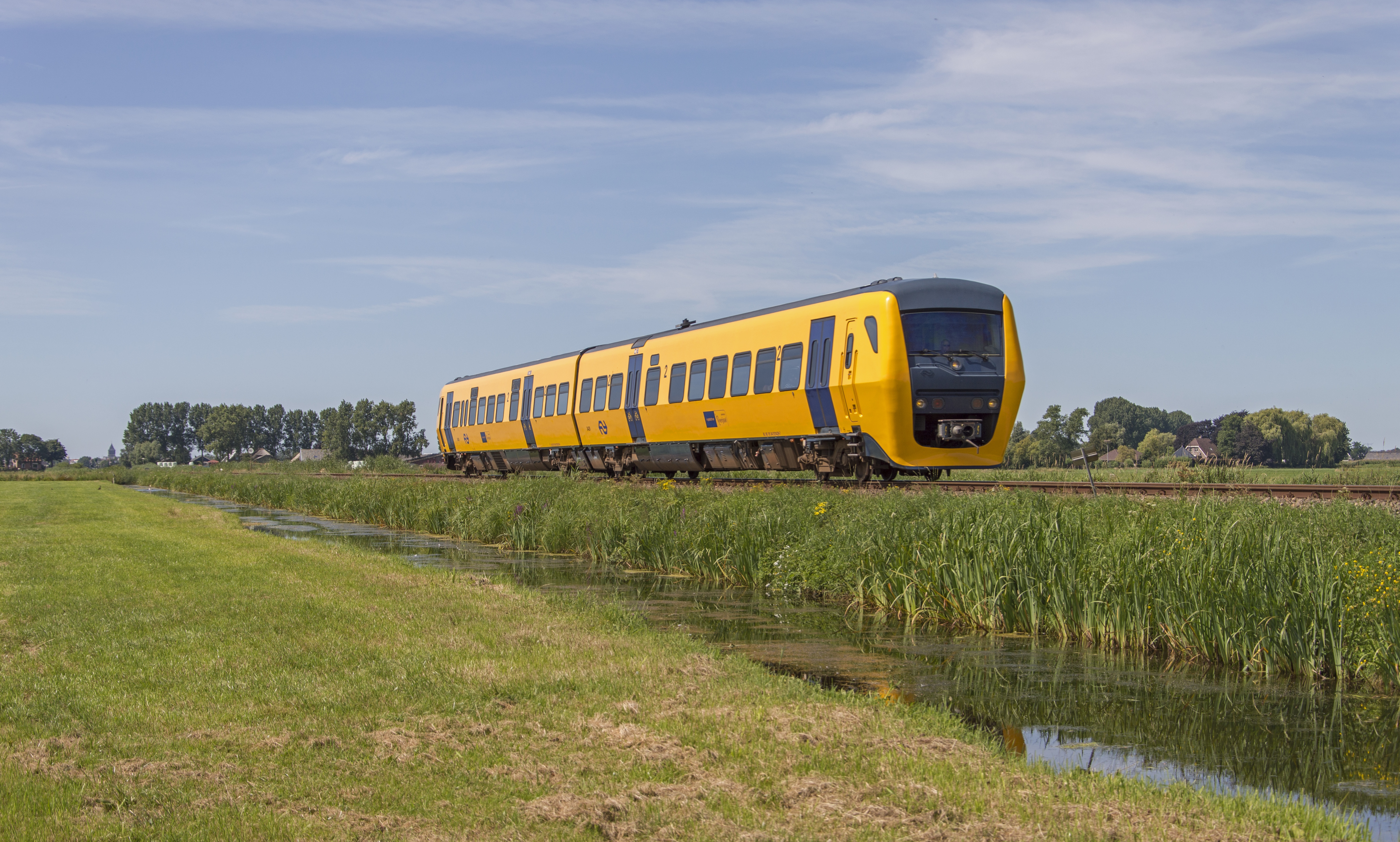 Door het landschap van IJsselmuiden rijdt NS DM'90 3429 als trein 8548 naar Zwolle en laat Kampen achter zich.